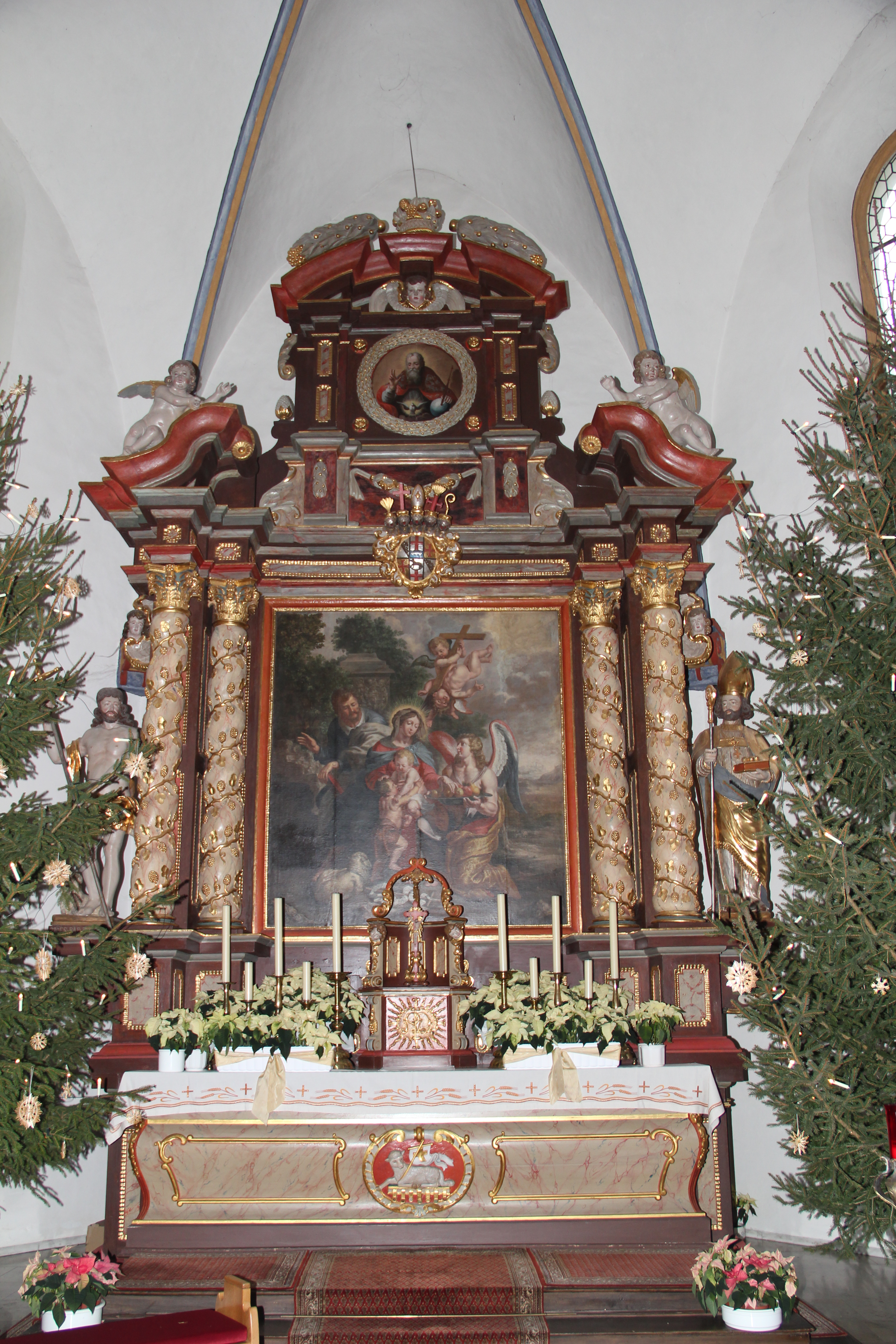 Hochaltar der Sankt-Johannes-Baptist-Kirche in Beverungen